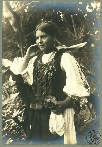 Adler - Costum popular feminin din Ighiu, jud. Alba